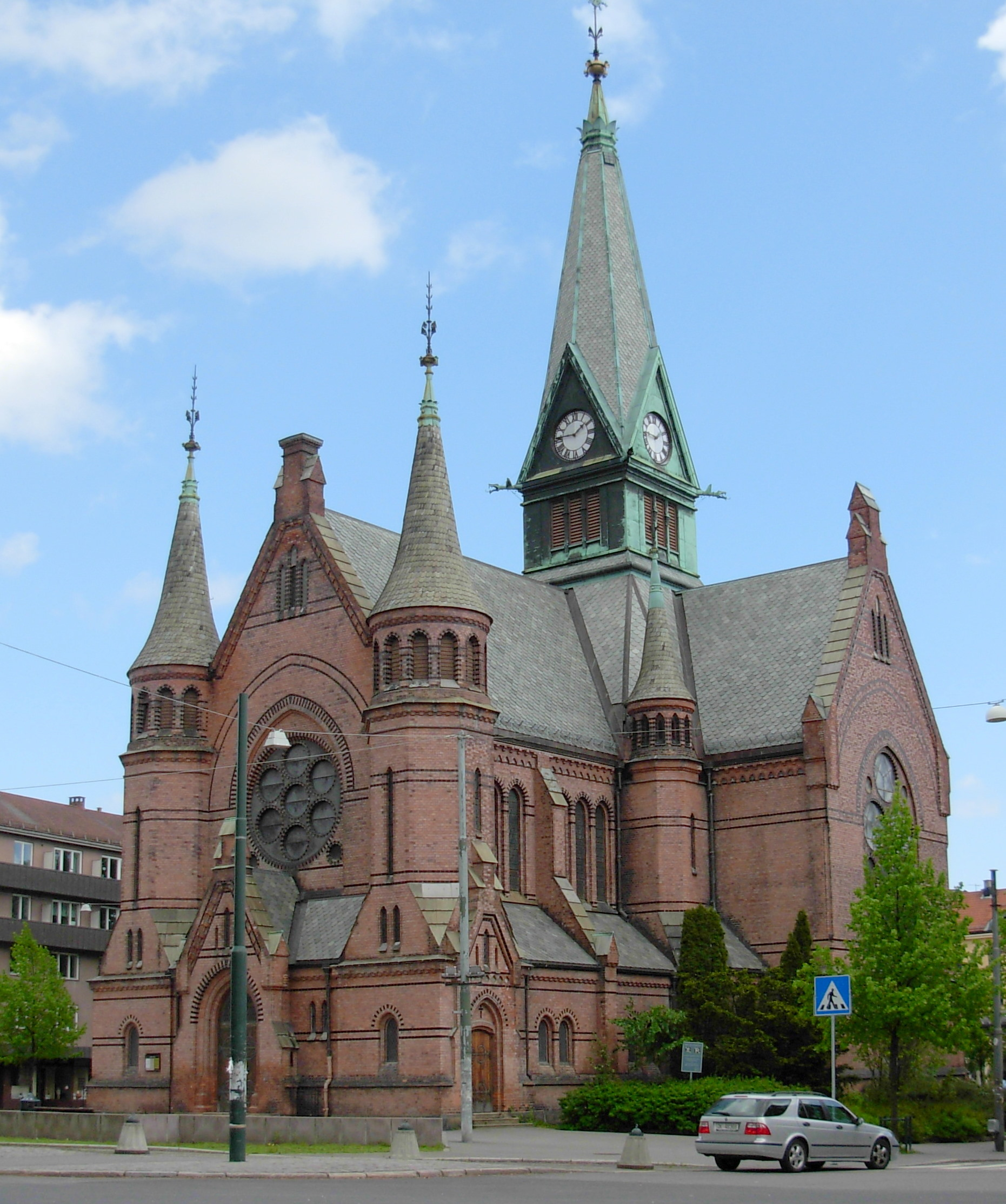 Sagene church, seen from Gråbeinsletta park, Sagene, Oslo